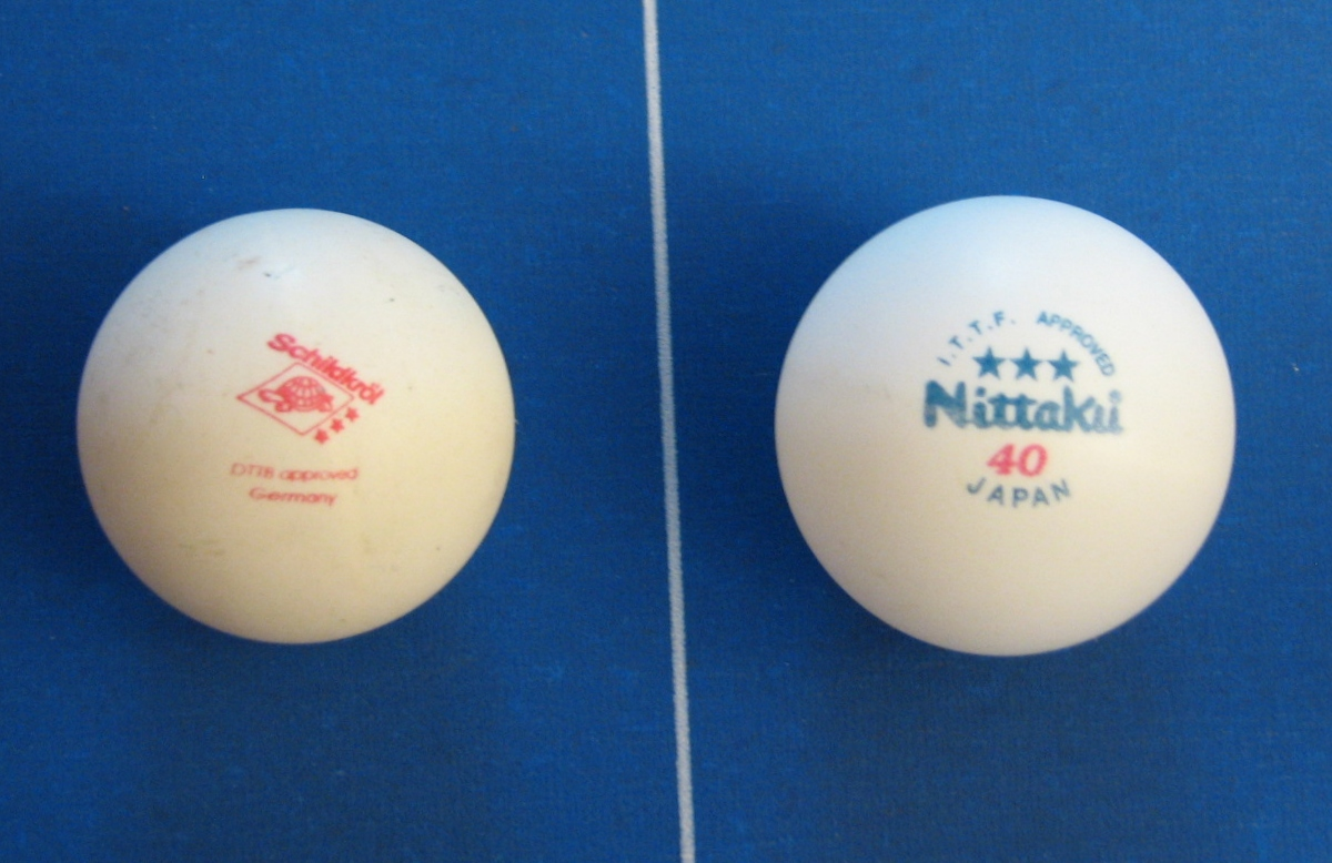 Template:Pelotas de 38 mm y de 40 mm.